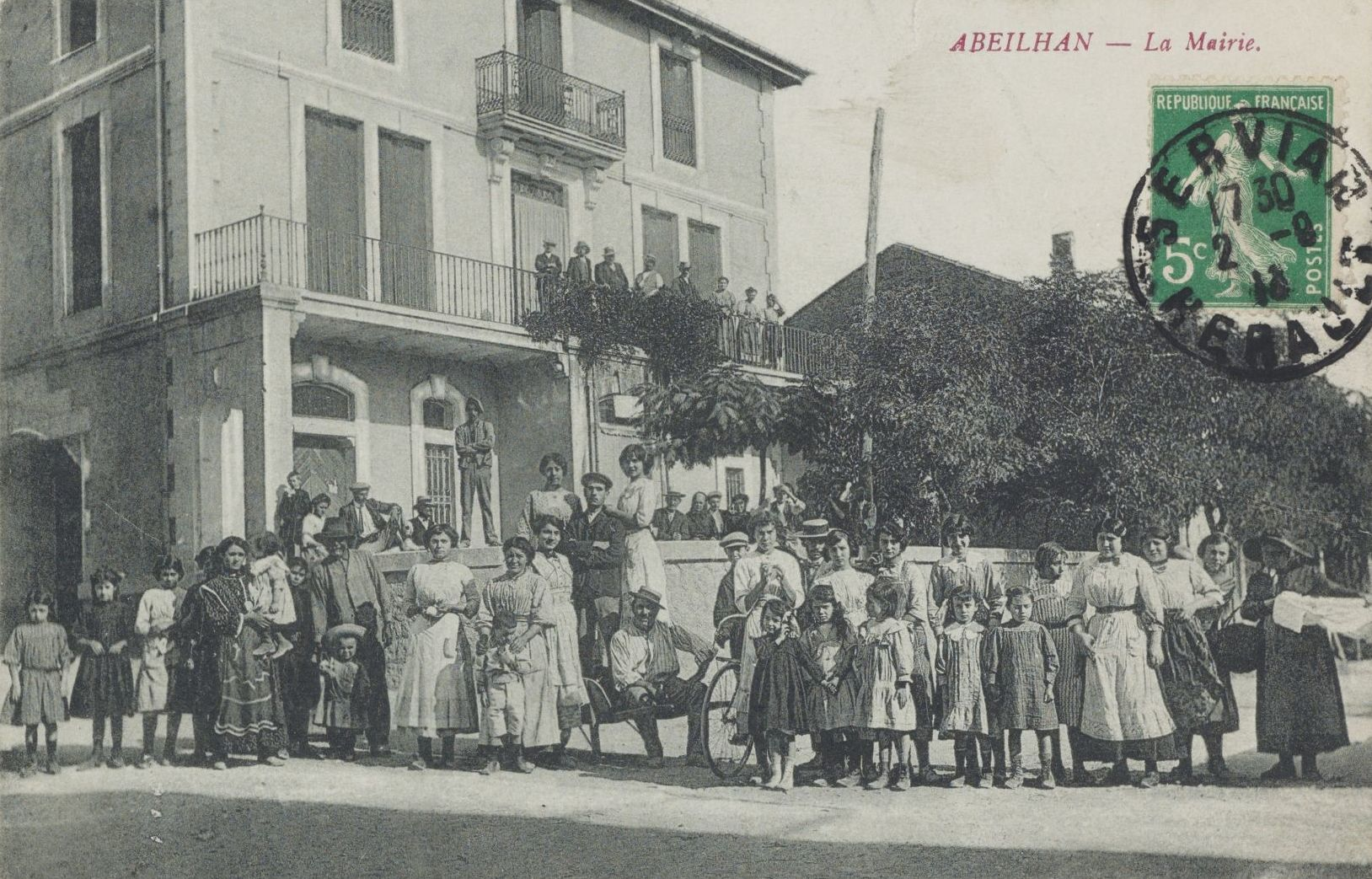 Abeilhan - La Mairie : carte postale